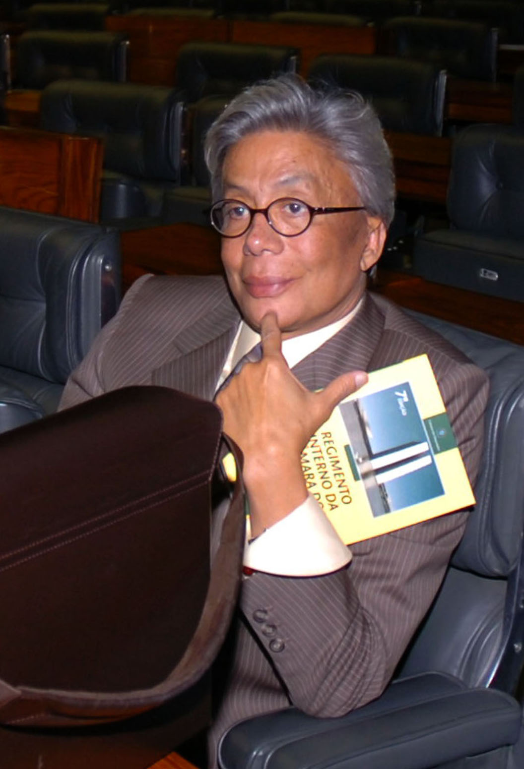 O deputado brasileiro Clodovil Hernandes no plenário da Câmara dos Deputados em Brasília.